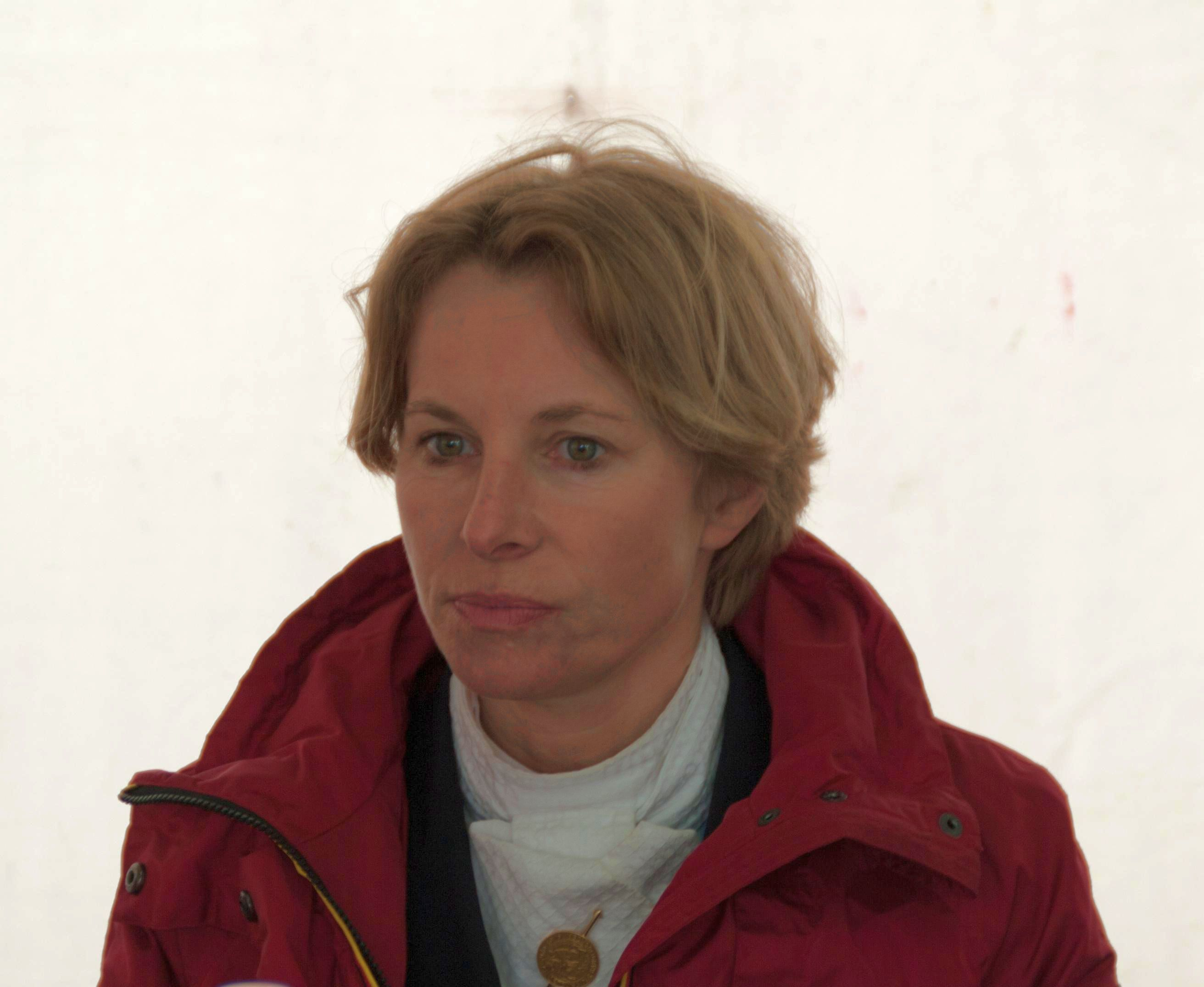 Horses & Dreams 2013: Nadine Capellmann bei einer Pressekonferenz